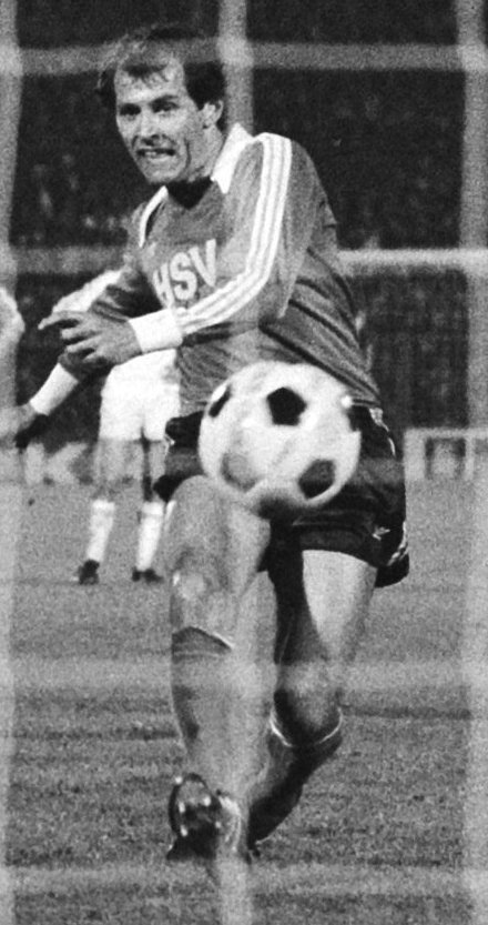 Collectie / Archief : Fotocollectie Anefo Reportage / Serie : [ onbekend ] Beschrijving : Anderlecht tegen HSV (finale Europa Cup II ); Georg Volkert (HSV) brengt uit een strafschop de stand op 1-0 Datum : 11 mei 1977 Locatie : Amsterdam Trefwoorden : sport, voetbal Persoonsnaam : Volkert, Georg Fotograaf : Peters, Hans / Anefo Auteursrechthebbende : Nationaal Archief Materiaalsoort : Negatief (zwart/wit) Nummer archiefinventaris : bekijk toegang 2.24.01.05 Bestanddeelnummer : 929-1735